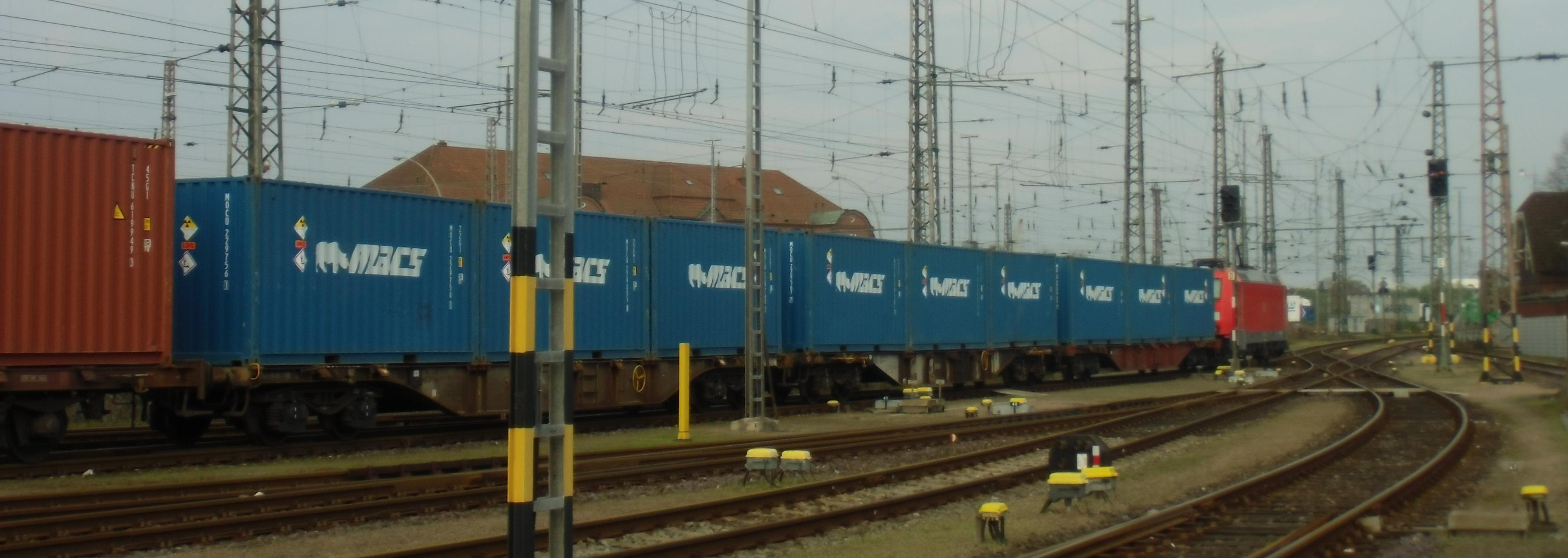 Convoi de minerai d'uranium photographié le 7 avril 2014 à Hambourg, à destination de Narbonne (usine Comurhex Malvesi) via Osnabrück-Munster-Cologne-Perl-Apache (passage frontière)-Woippy-Miramas-Montpellier-Beziers.